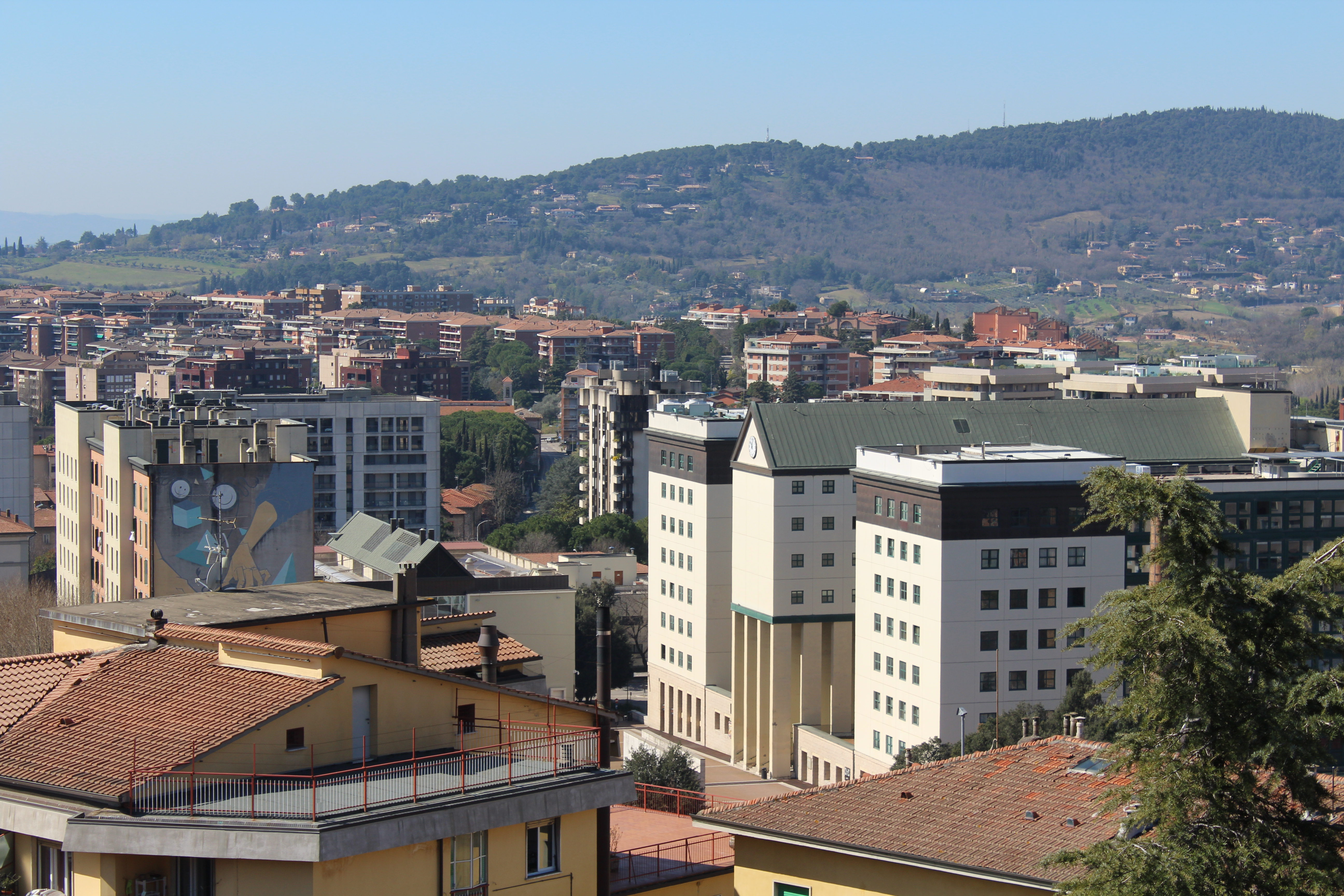 Il Broletto, una delle principali sedi della Regione Umbria